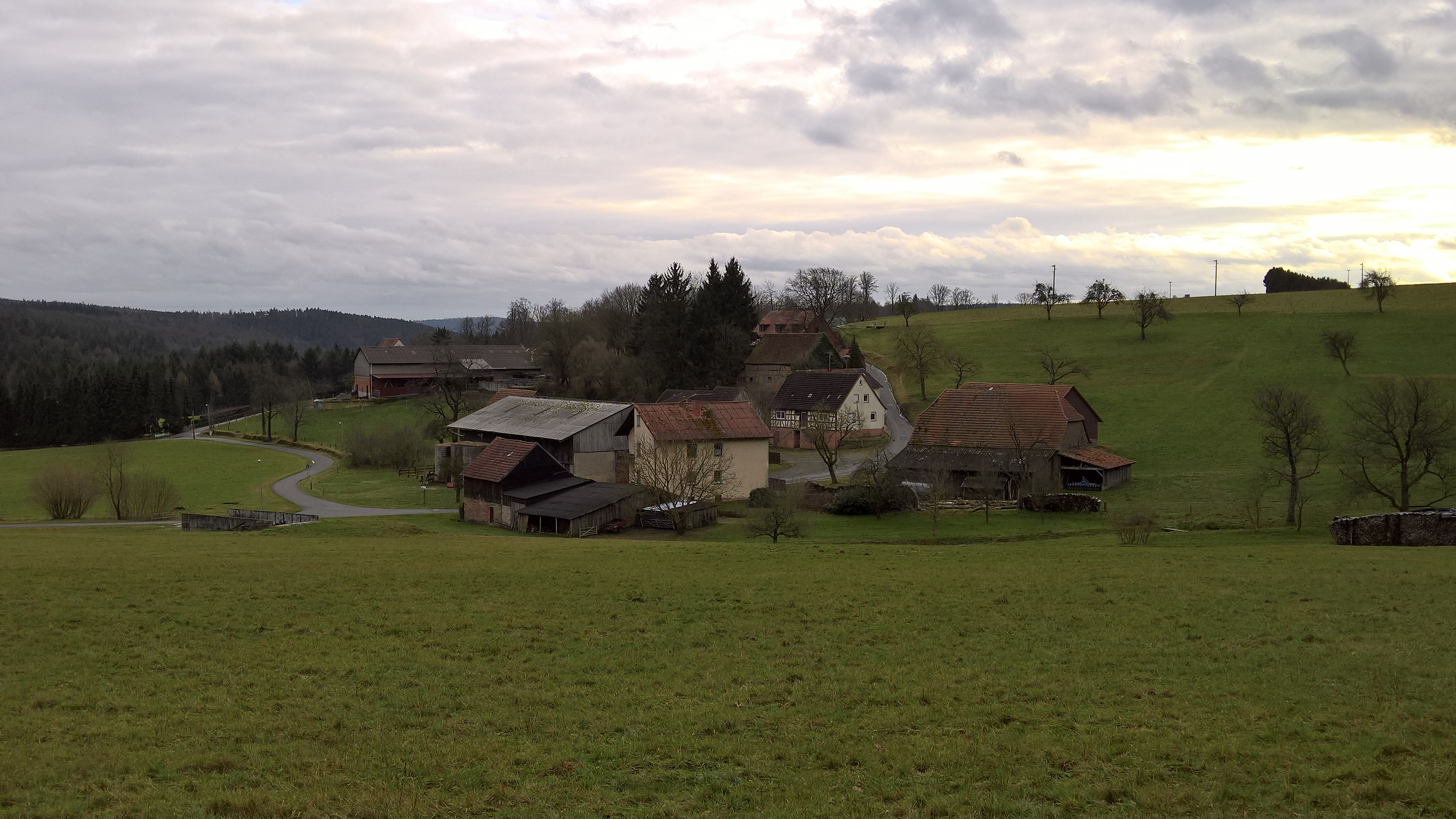 Bremhof, Einöde im Ortsteil Vielbrunn von Michelstadt im Odenwald